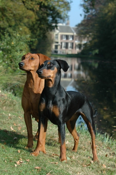 Duitse Pinchers, black & tan en rood. Categorie:Afbeelding hond